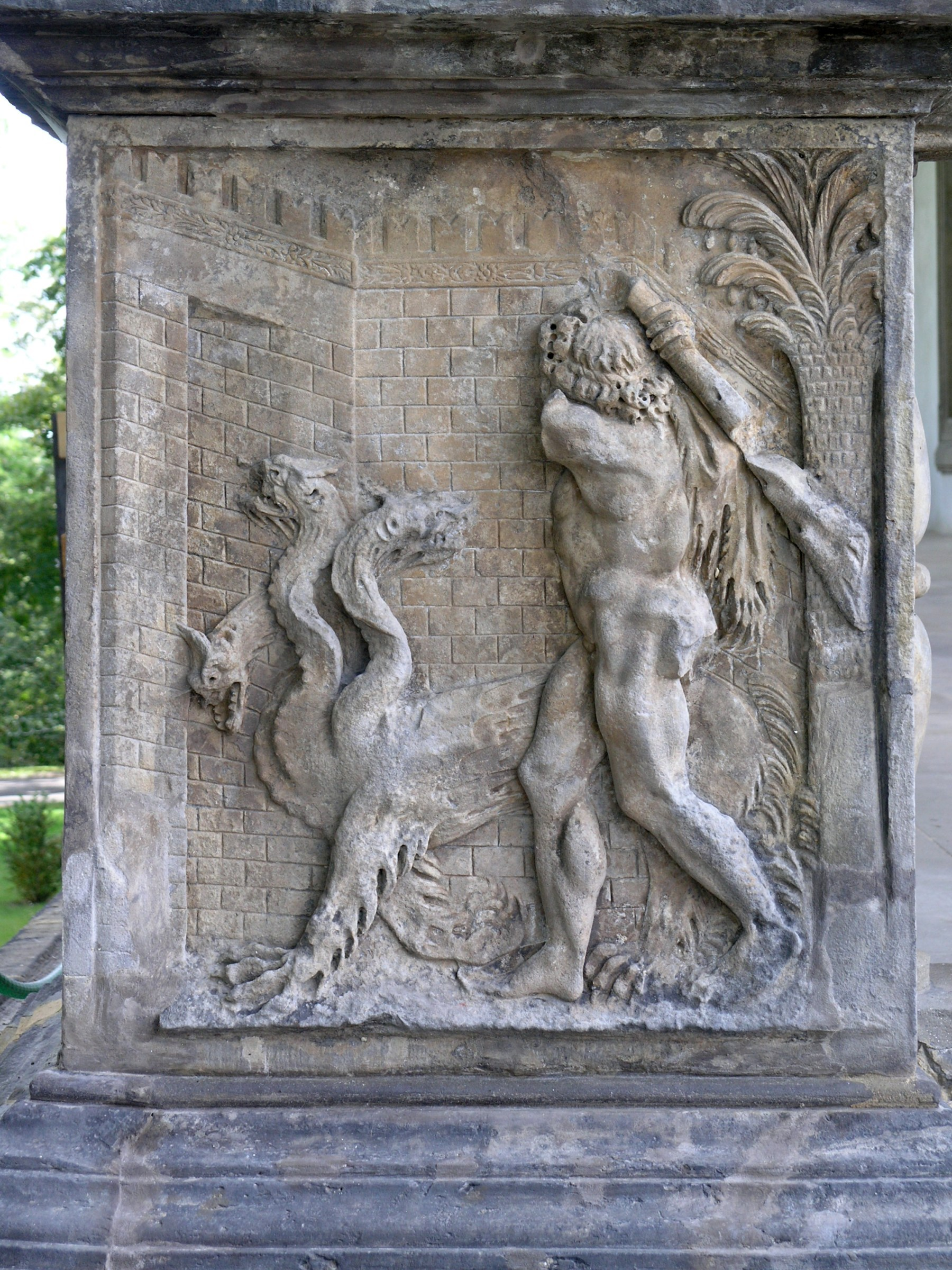 Praha, Hradčany - Letohrádek královny Anny, jeden z reliéfů na severní straně